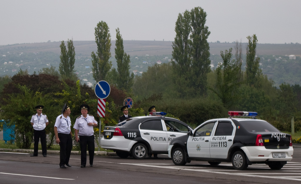 Дорожная полиция Республики Молдова